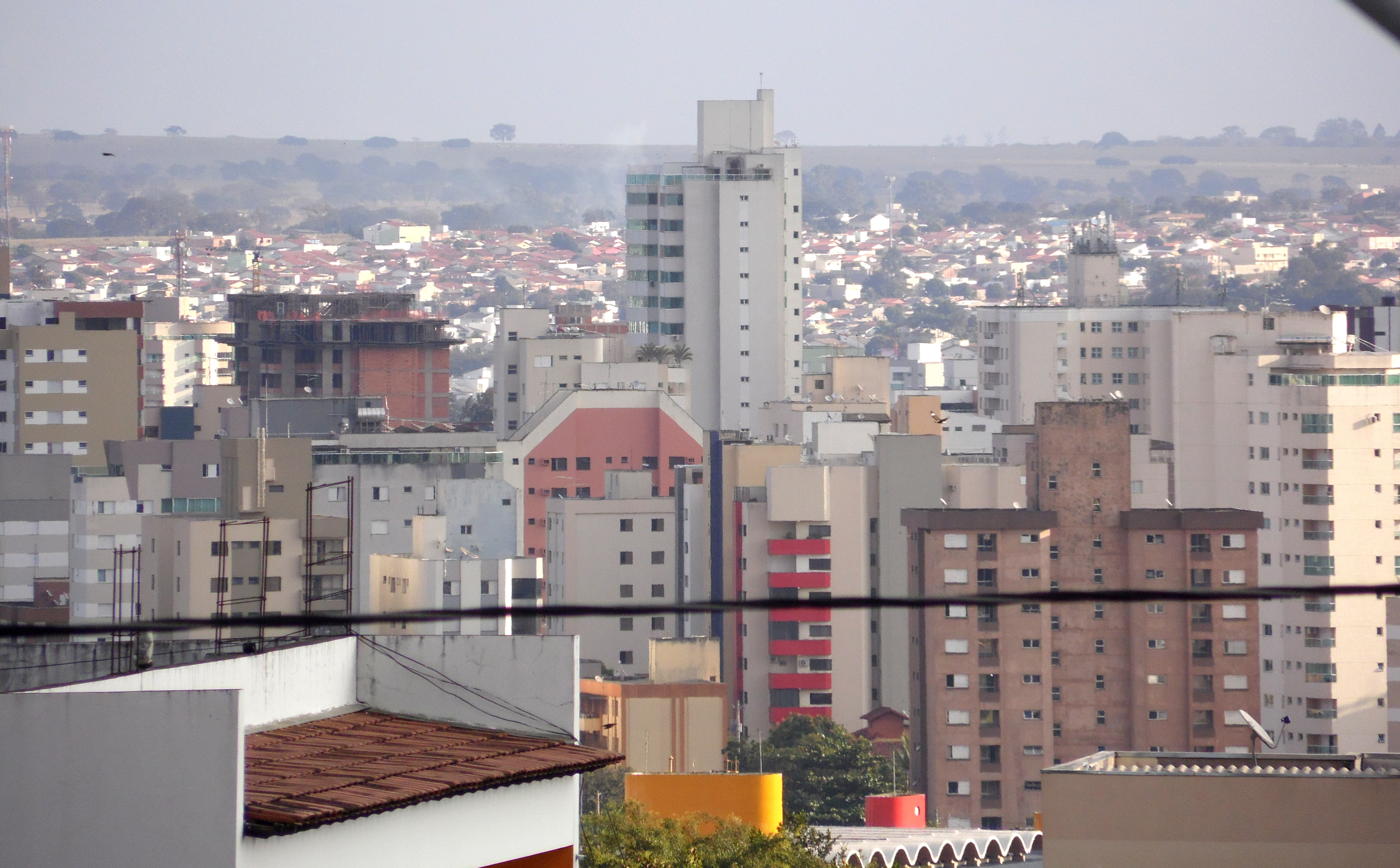 Vista parcial de Santa Maria, na Zona Sul de Uberlândia.